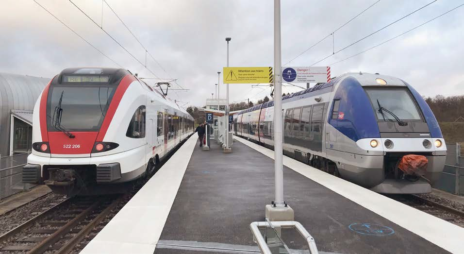 SBB RABe 522 und SNCF Class Z 27500 im Bahnhof Meroux